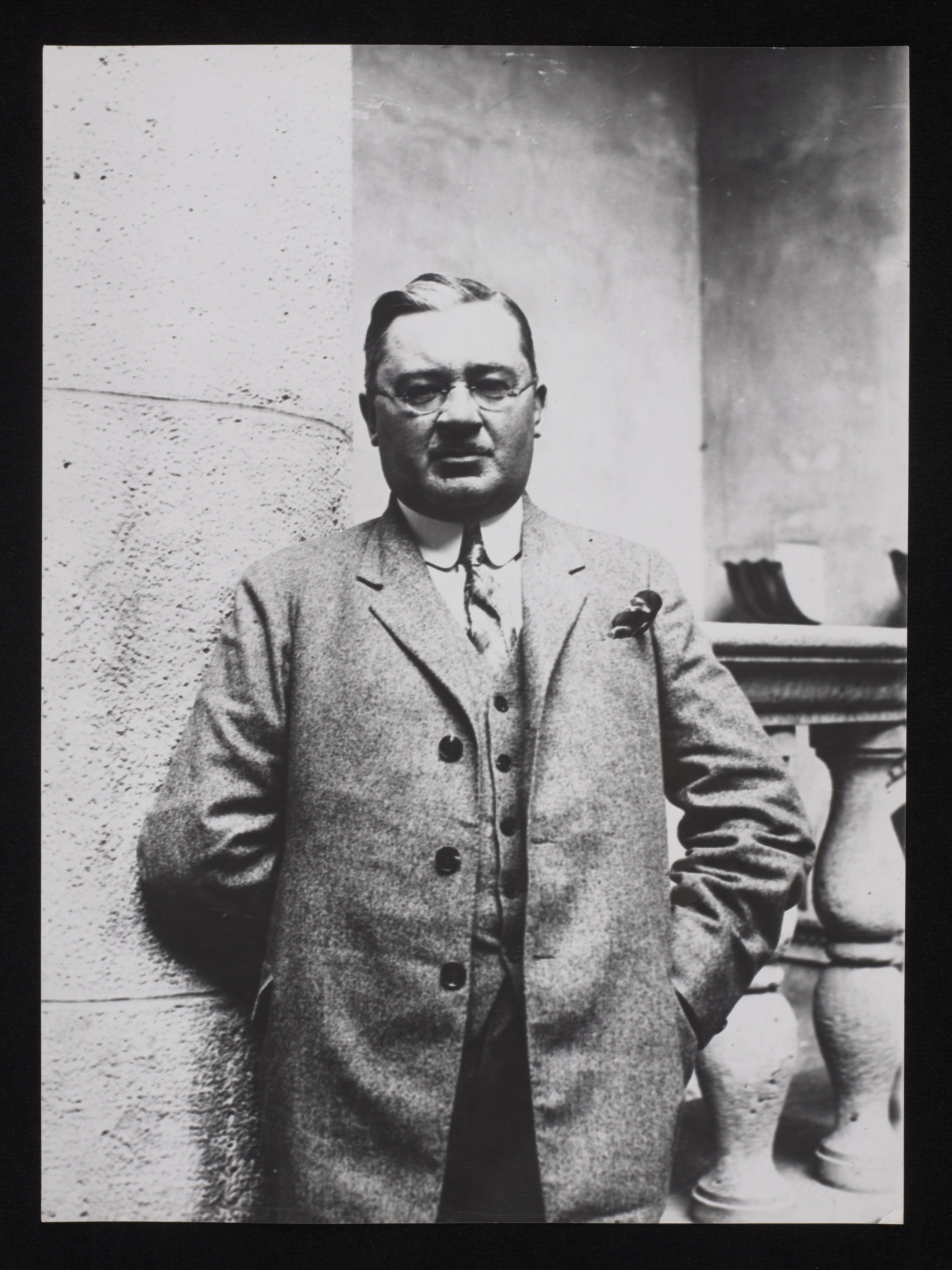 Adolf Szyszko-Bohusz, Lata 1930.